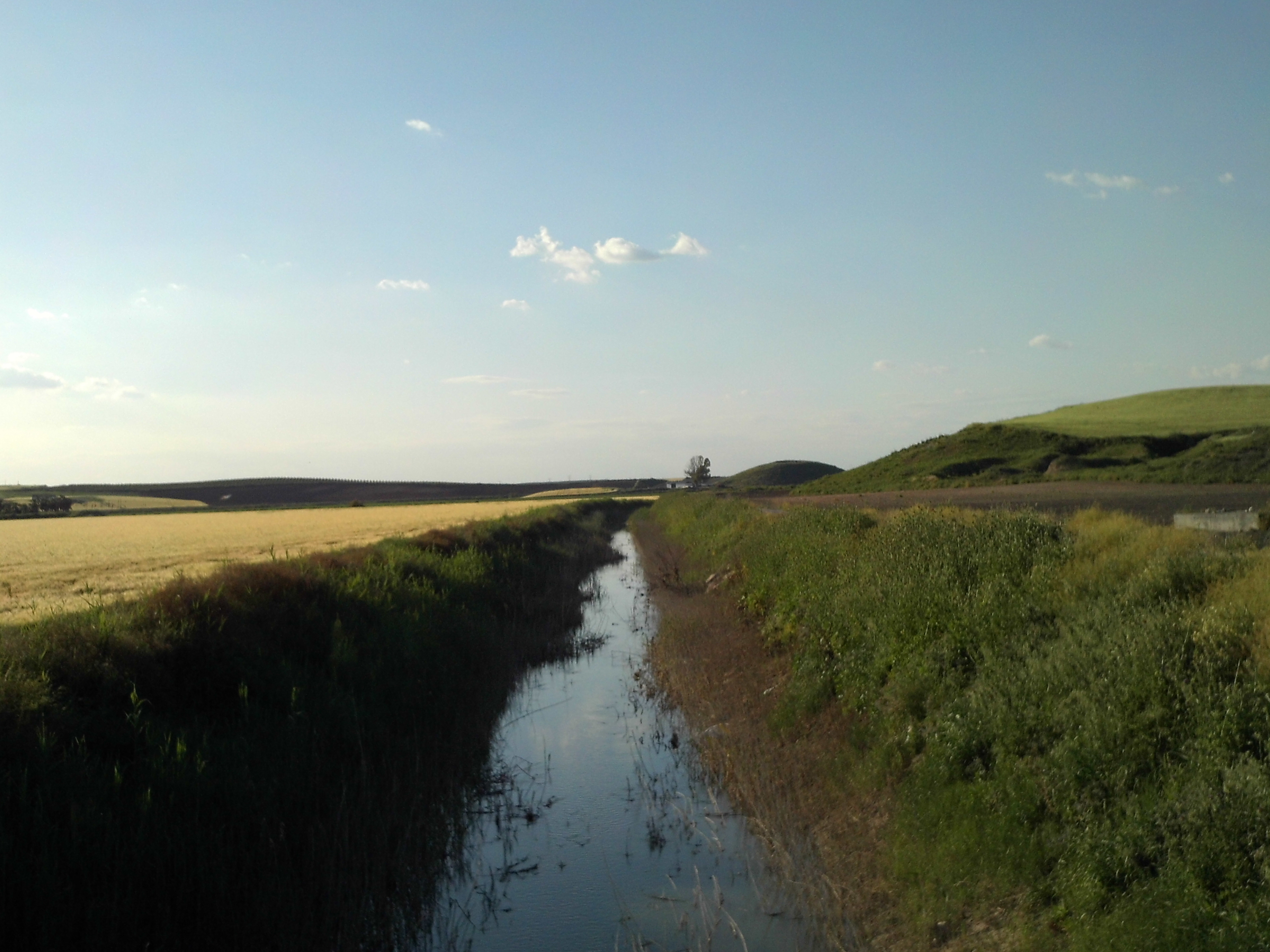 Río Salado. El Palmar de Troya. Utrera, provincia de Sevilla, Andalucía, España.